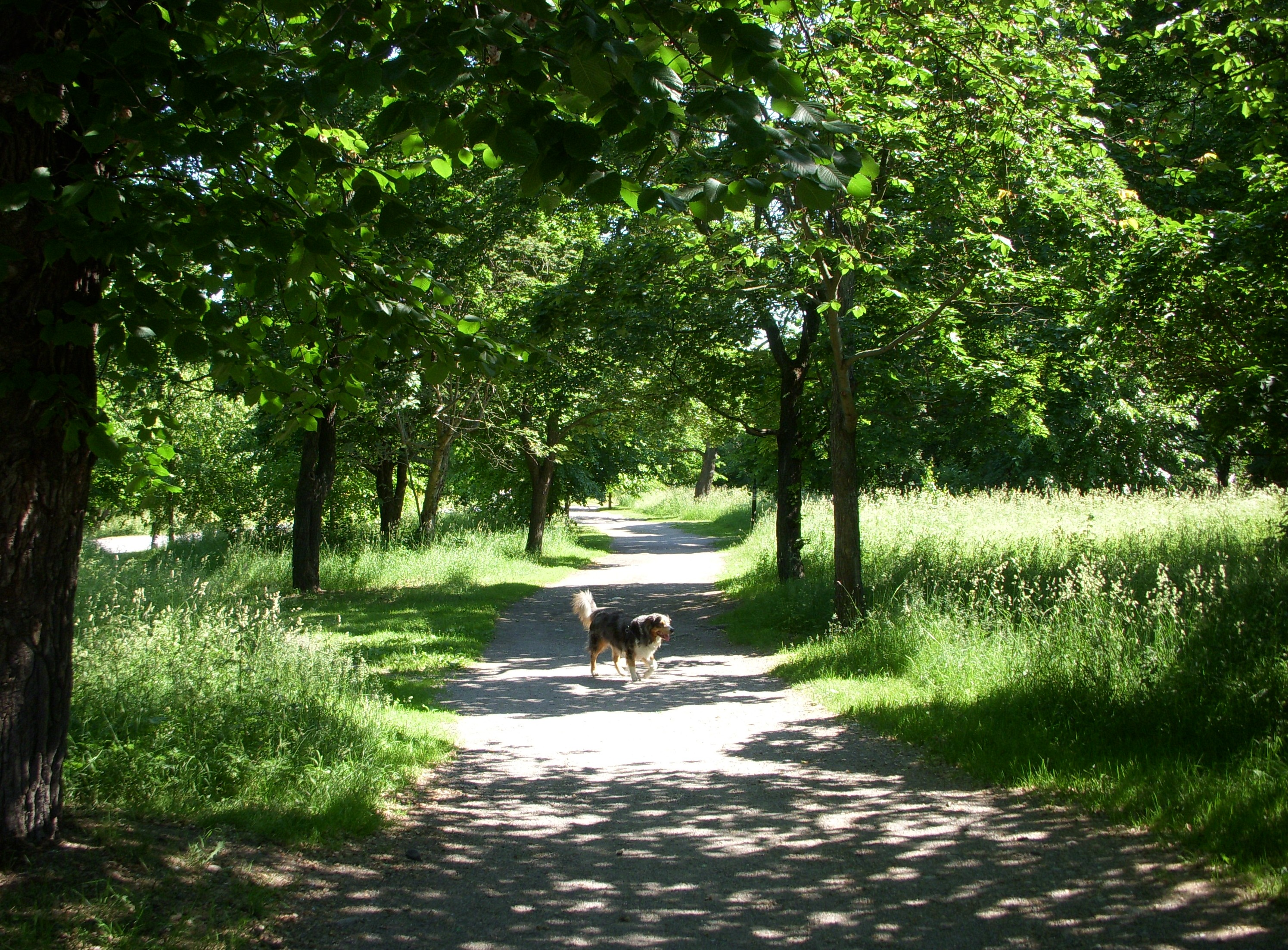 Kolerakyrkogården i Stockholm, parkväg